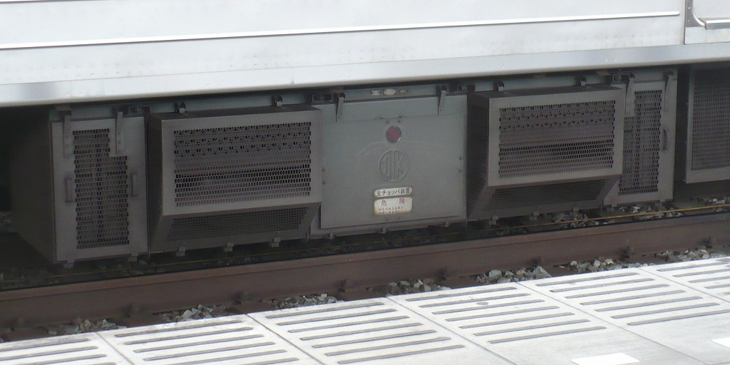 東武9000系チョッパ装置